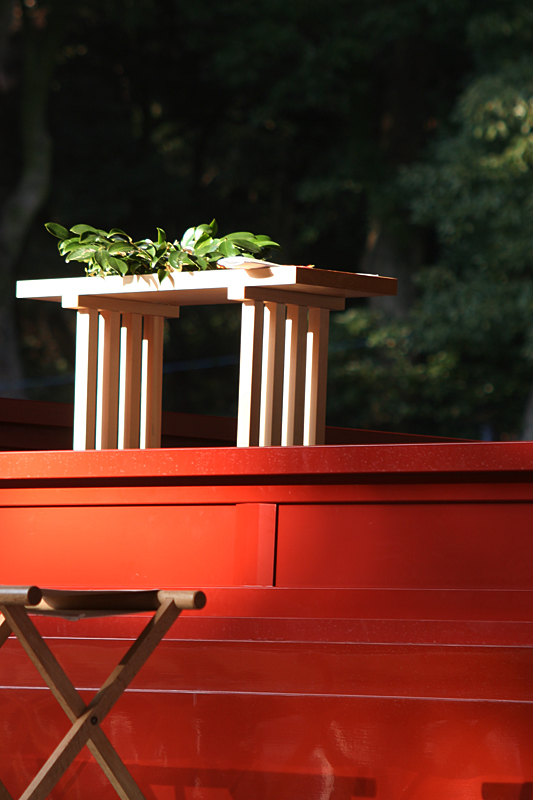 @ Tsurugaoka Hachiman Shrine, Kamakura